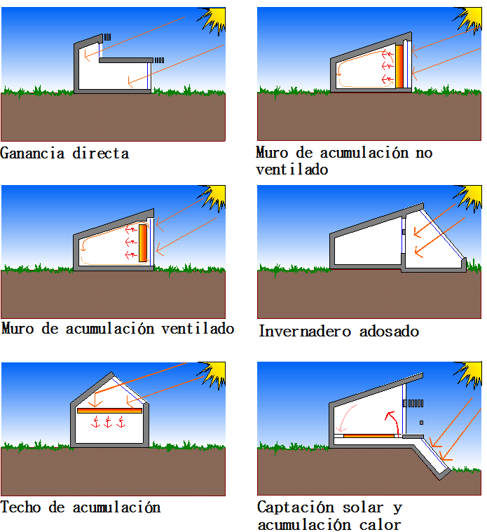 Diferentes tipos de sistemas pasivos para climatización de edificios.